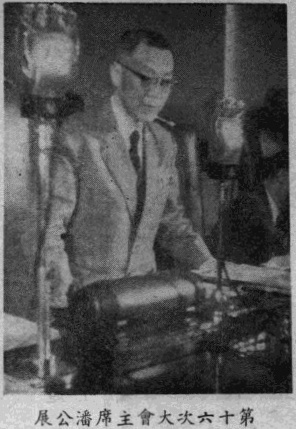 第一屆國民大會專輯圖片